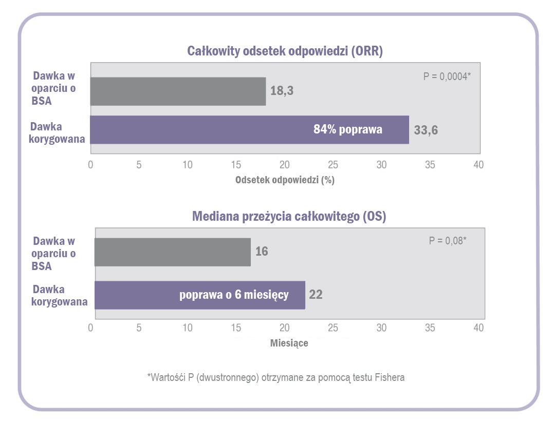 Porównanie odpowiedzi na leczenie 5-fluorouracylem, w zależności od sposobu dobierania dawki. BSA – dawka leku jest obliczana w stosunku do pola powierzchni ciała. korygowana – na podstawie cotygodniowego pomiaru stężenia leku w surowicy[1].